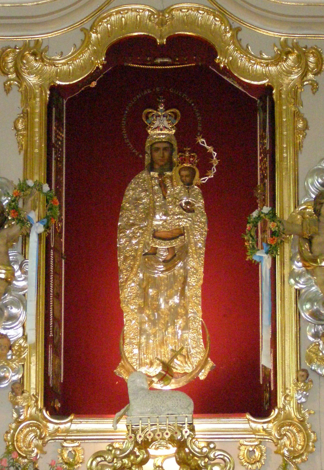 Sanktuarium Maryjne w Górce Klasztornej - obraz Matki Bożej